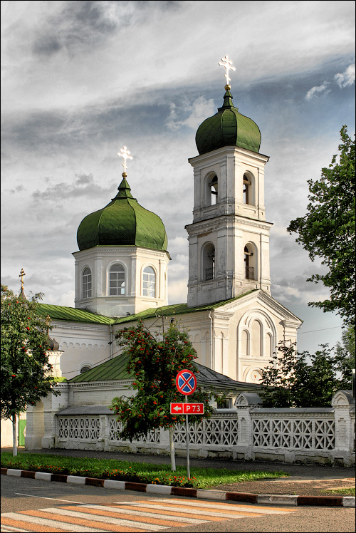 Мсціслаўскія замалёўкі